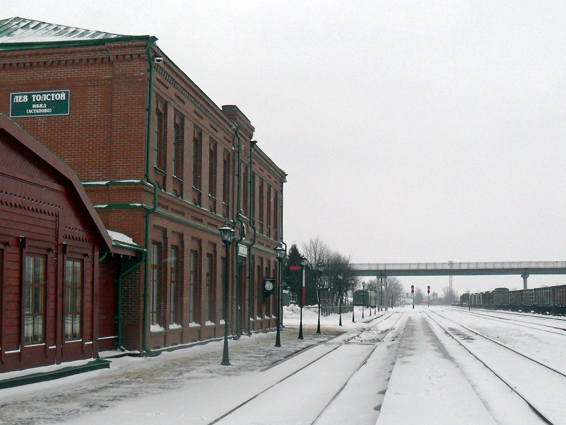 ЖД вокзальный комплекс Лев Толстой (Астапово) после реконструкции (2010)